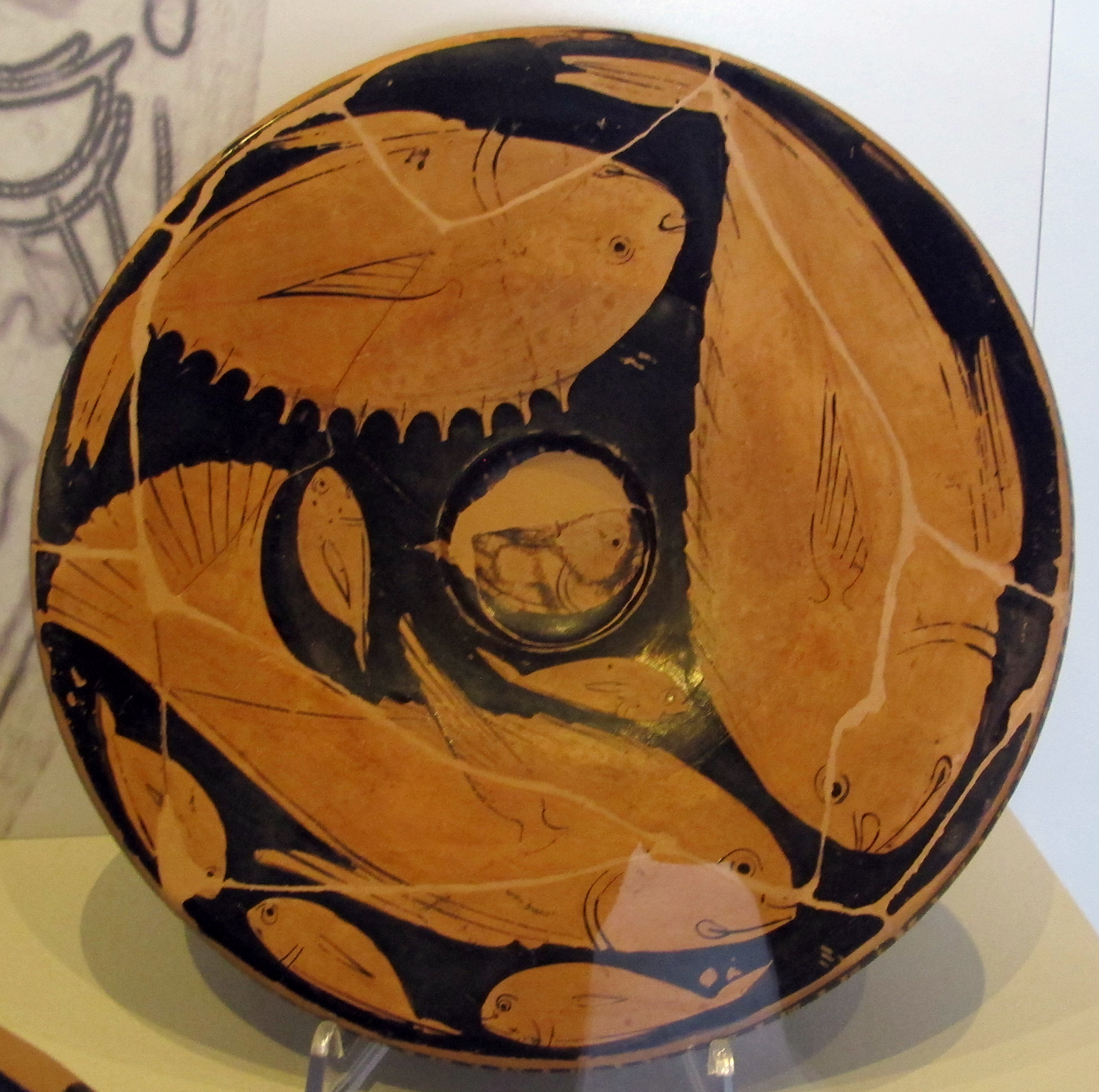 Museo Archeologico Nazionale - MIBAC This is a photo of a monument which is part of cultural heritage of Italy.